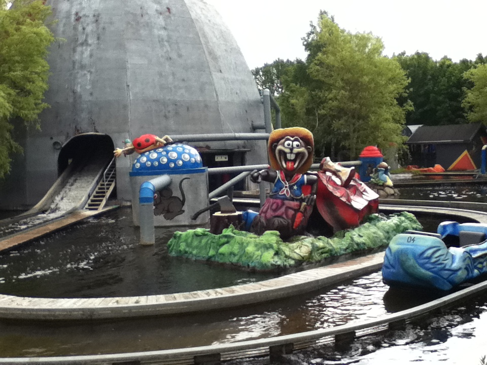 BonBon-Lands forlystelse Vandrotten med spejder.